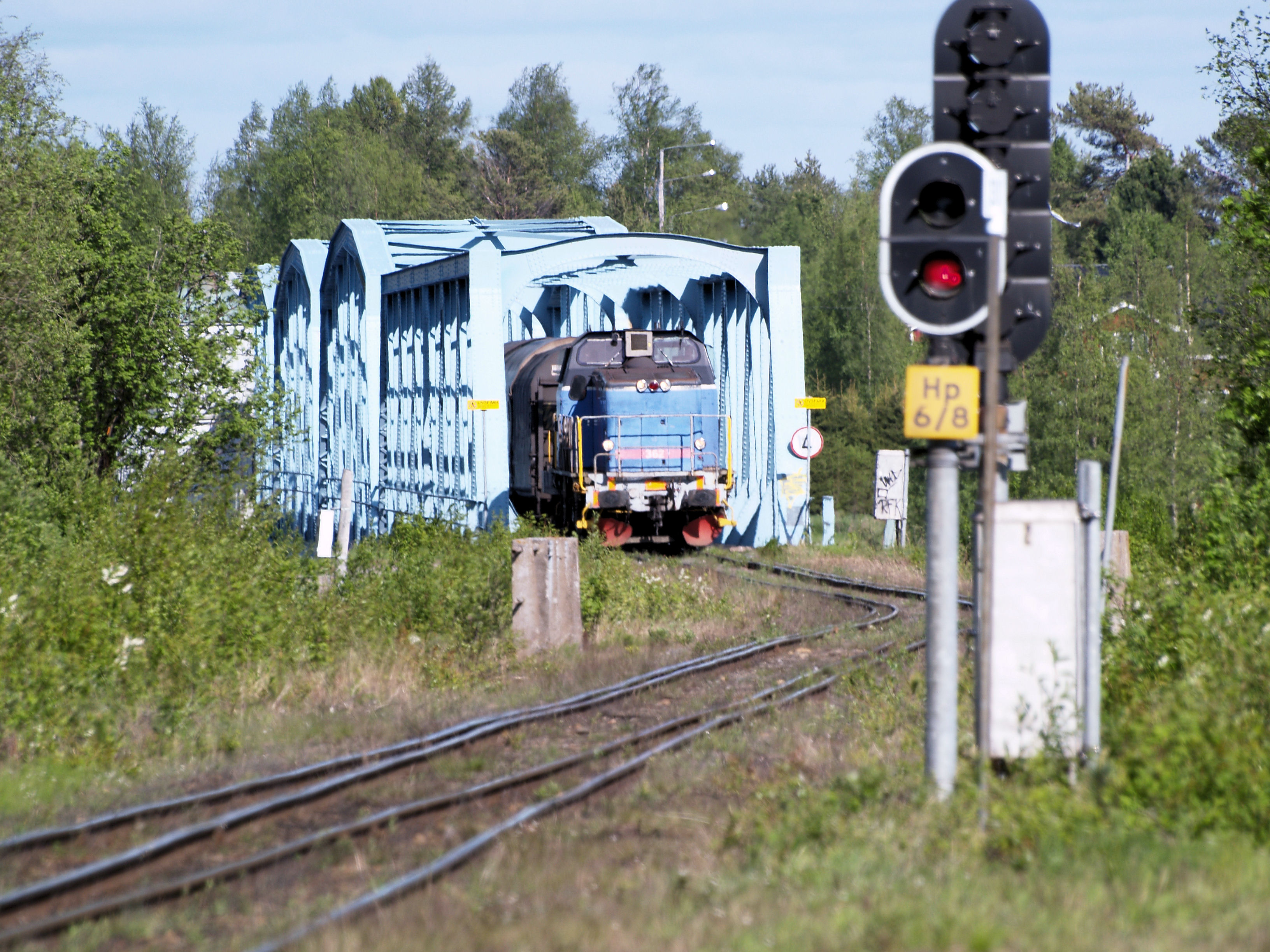 Green Cargo T44 362 med tåg på bro över Torne älv.